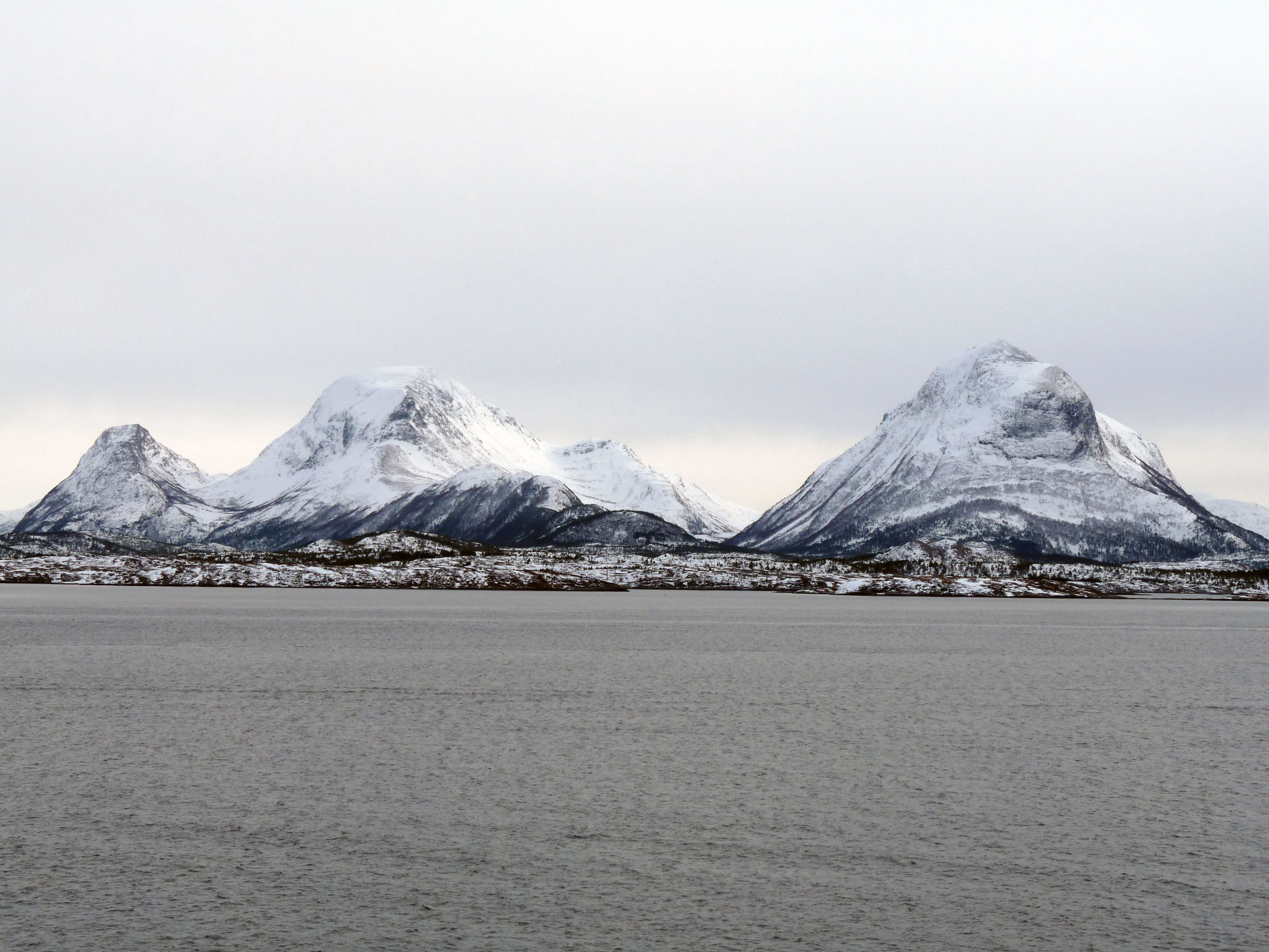 14 Tustana